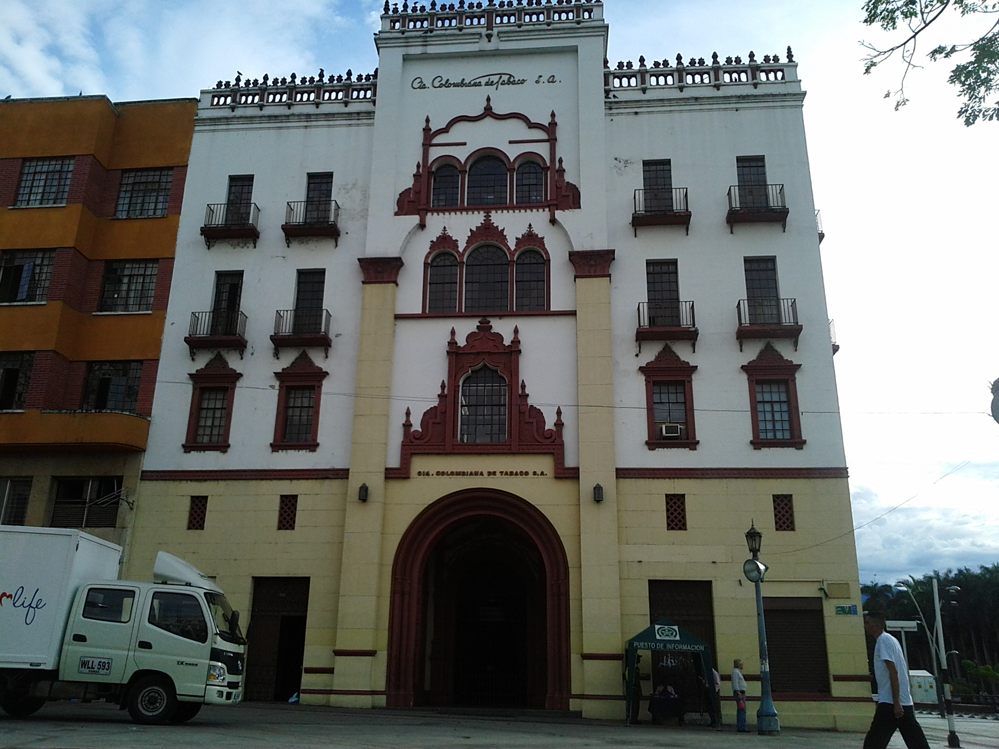 Edificio Coltabaco